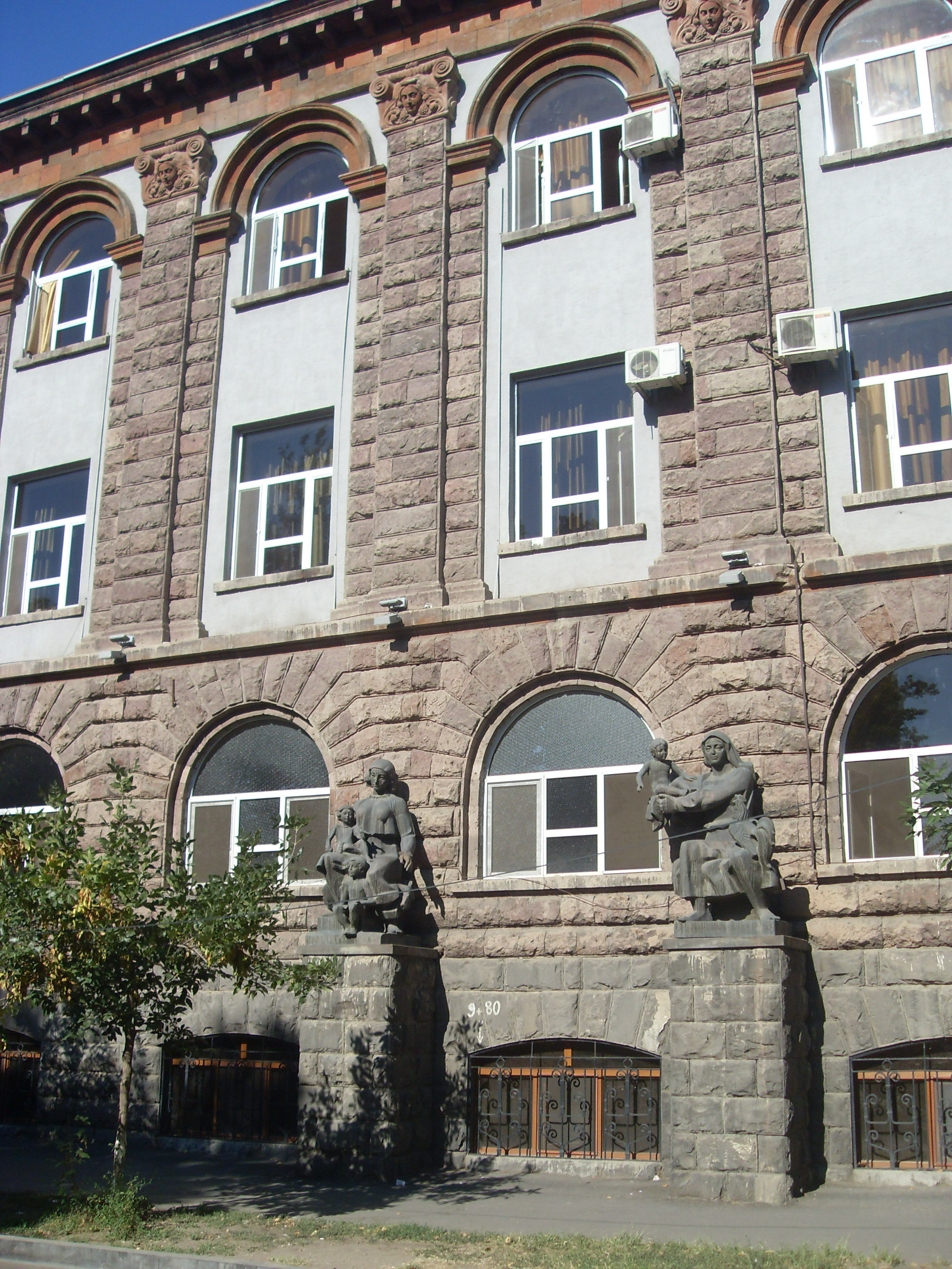 Ծննդատան շենք. Պարգև Մարգարյանի անվան Մոր և մանկան առողջության պահպանման հայկական գիտահետազոտական կենտրոն, 1931 թ.. 1936-1939 թթ., Երևան, ճարտ.` Մ. Գրիգորյան, Ն. Բունիաթյան 6/82